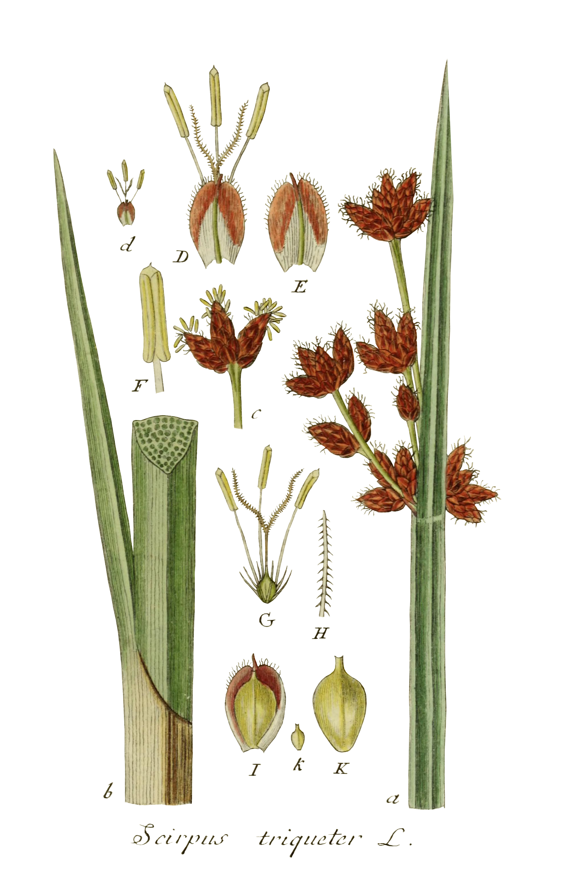 Illustration of Scirpus triqueter L. = Schoenoplectus triqueter